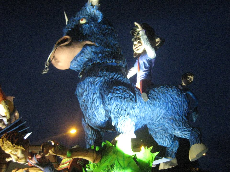 Carro allegorico del Carnevale Strianese 2012